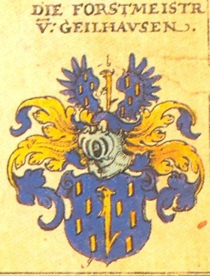 Johann Siebmacher: New Wappenbuch eingescannt aus: Horst Appuhn (Hrsg.), Johann Siebmachers Wappenbuch. Die bibliophilen Taschenbücher 538, 2. verb. Aufl , Dortmund 1989 Rheinische Blatt 127